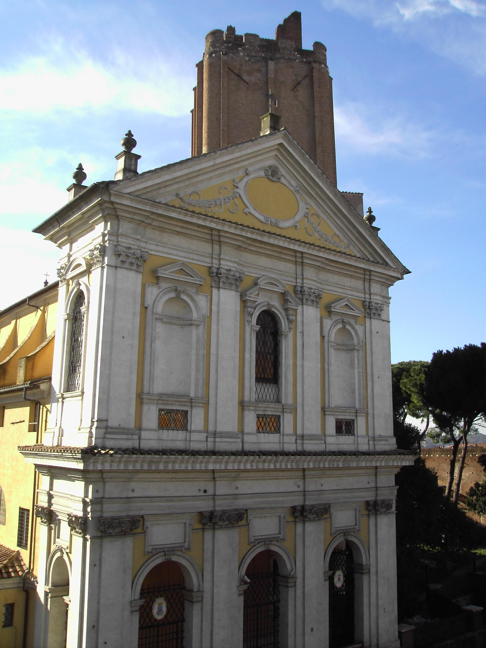 Roma, santa Caterina in Magnanapoli e Torre delle Milizie.